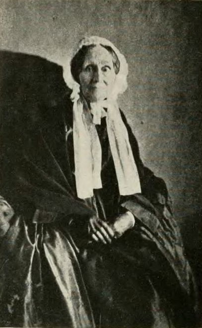 Electronic reproduction